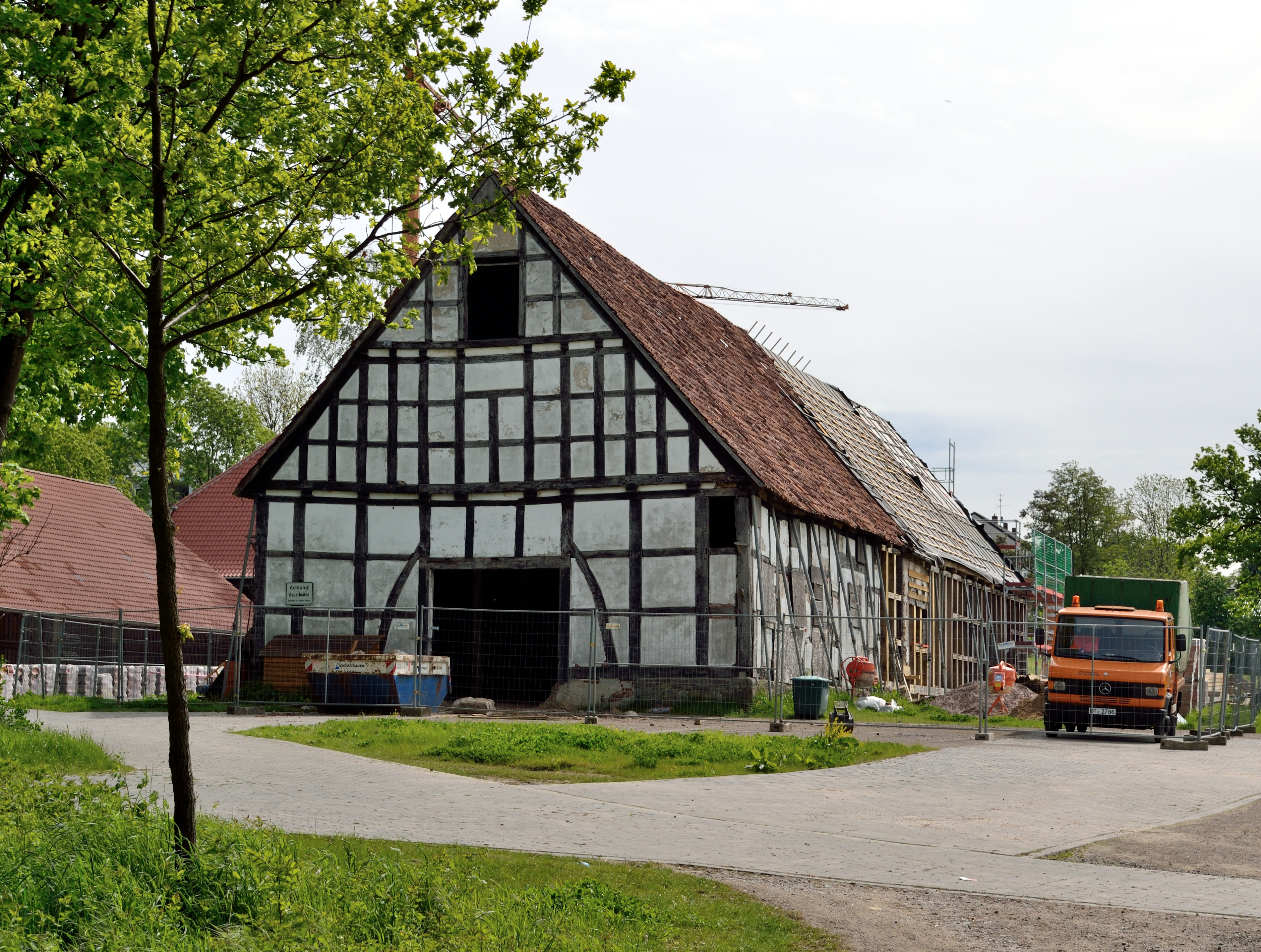 Gut Herberhausen, Objekt 6: ehemaliger Kuhstall This is a photograph of an architectural monument.